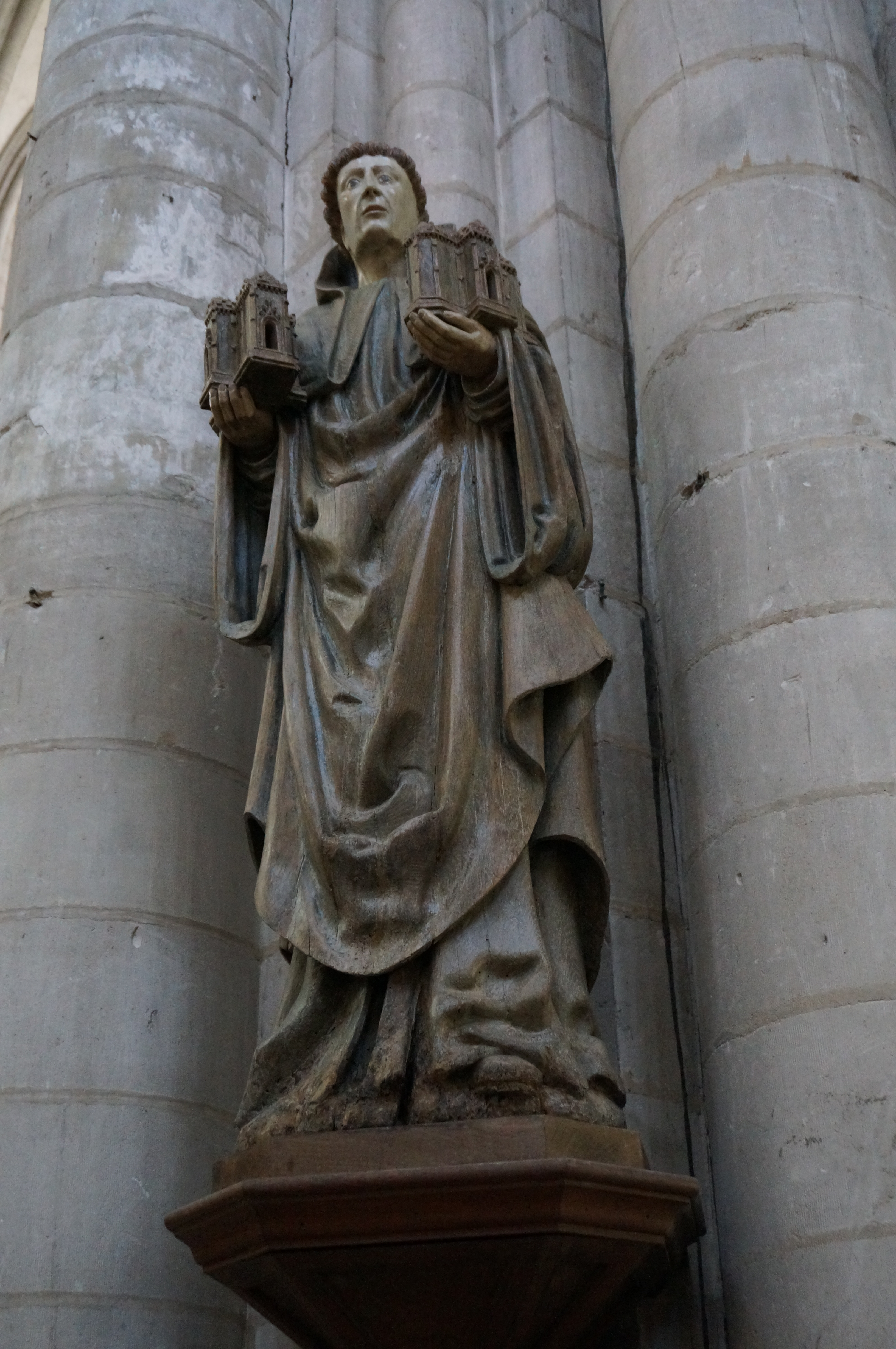 Troyes (Aube, France), église de la Madeleine, statue en bois du XVe siècle représentant Robert de Molesme.